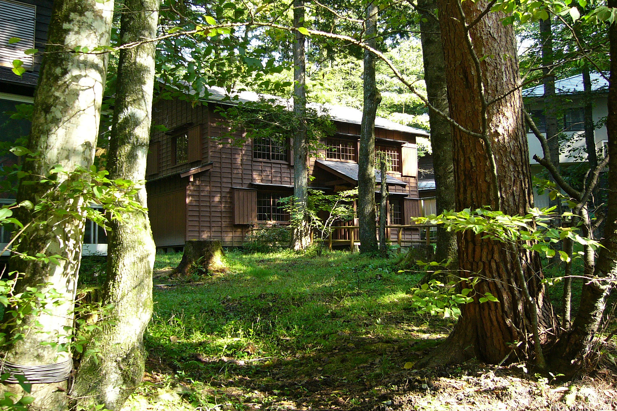 Shaw house in Karuizawa, Nagano, Japan